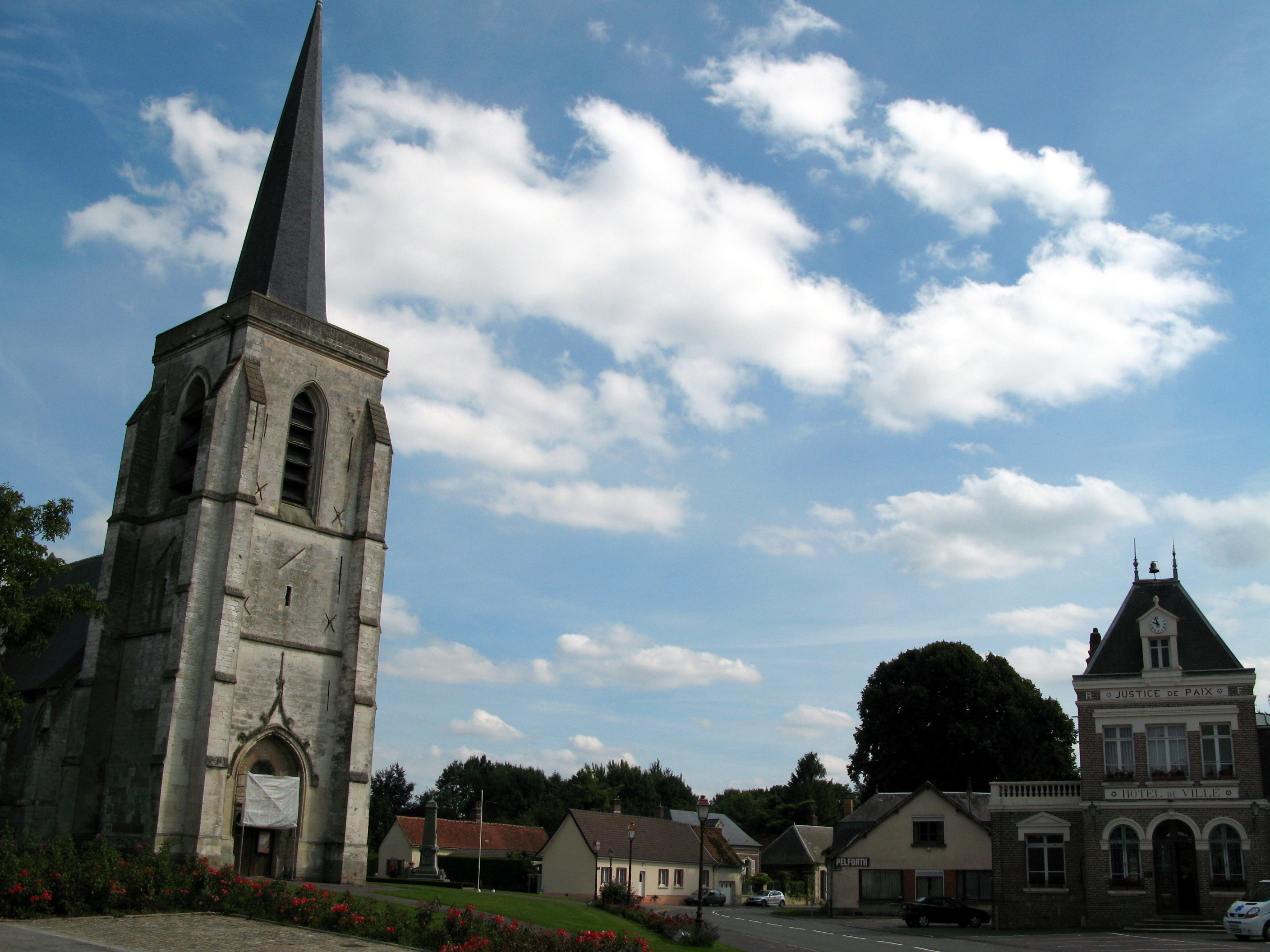 Ailly-le-Haut-Clocher (Somme, France) - Place centrale. L'église, le monument aux morts, et (de l'autre côté de la rue menant à Villers-sous-Ailly) l'hôtel-de-ville. Curieux hasard : Le nuage semble dessiner bizarrement la lettre "a" minuscule, ... comme le "a" de Ailly ?